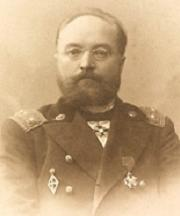 Epimah-Shipilo, Bronislaw Ignat'evich